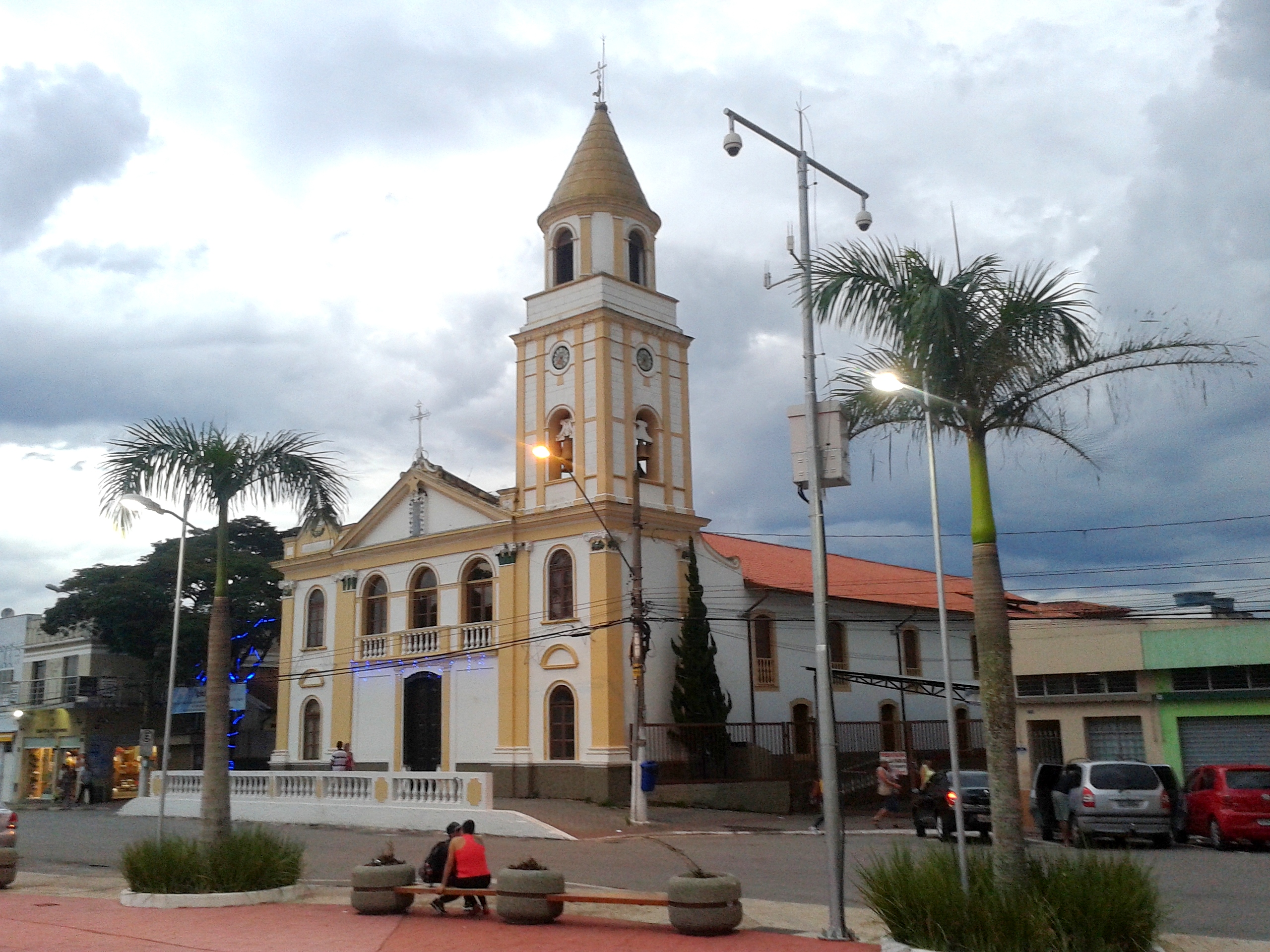 Igreja de Nossa Senhora do Monte Serrate, na Praça da Matriz, Cotia, SP, Brasil.